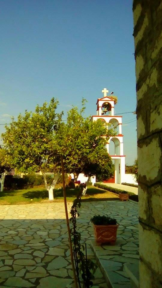 Το καμπαναριό της Αγίας Κυριακής Απομέρου.